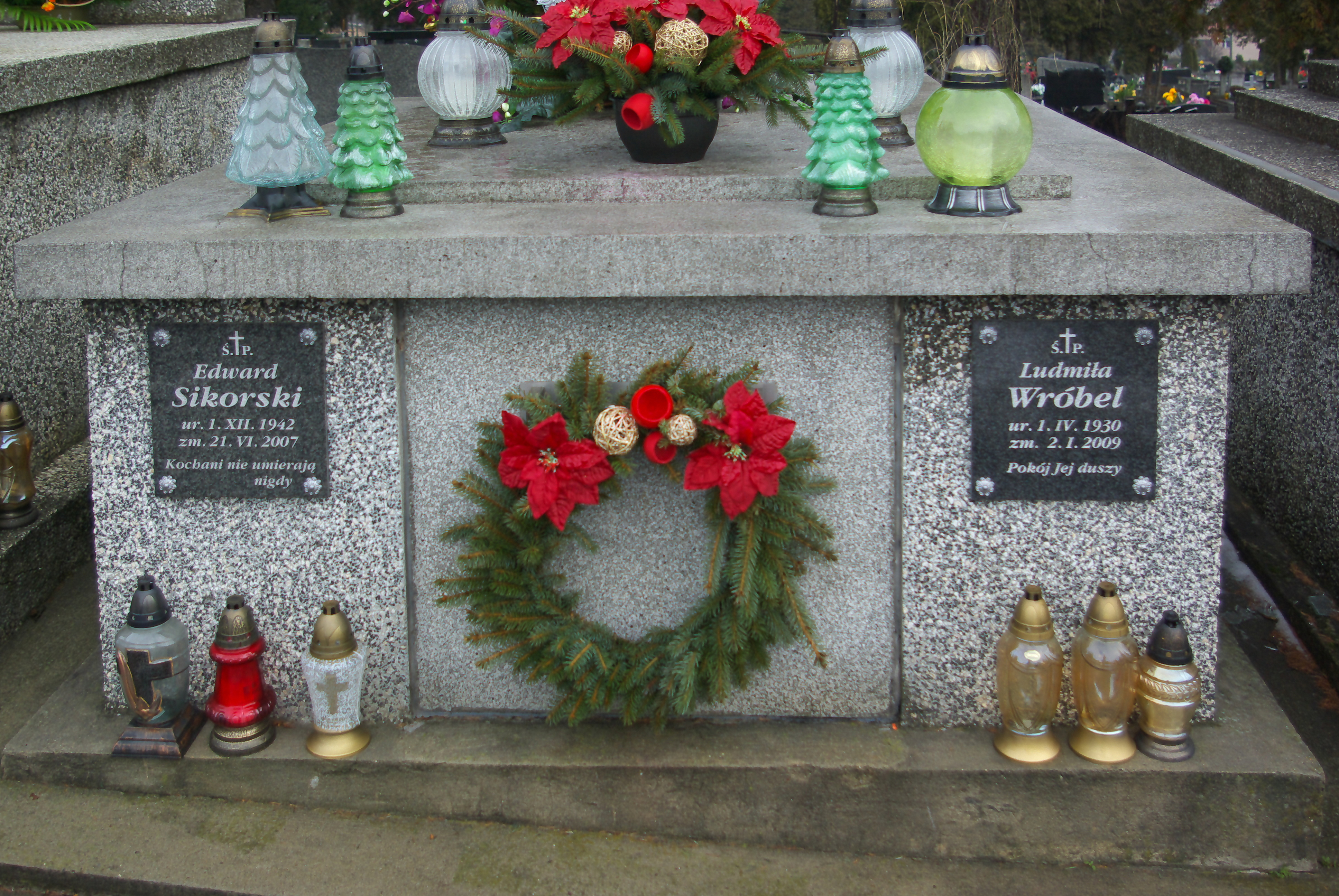 Nagrobek Edwarda Sikorskiego i Ludmiły Wróbel na Cmentarzu Centralnym w Sanoku.